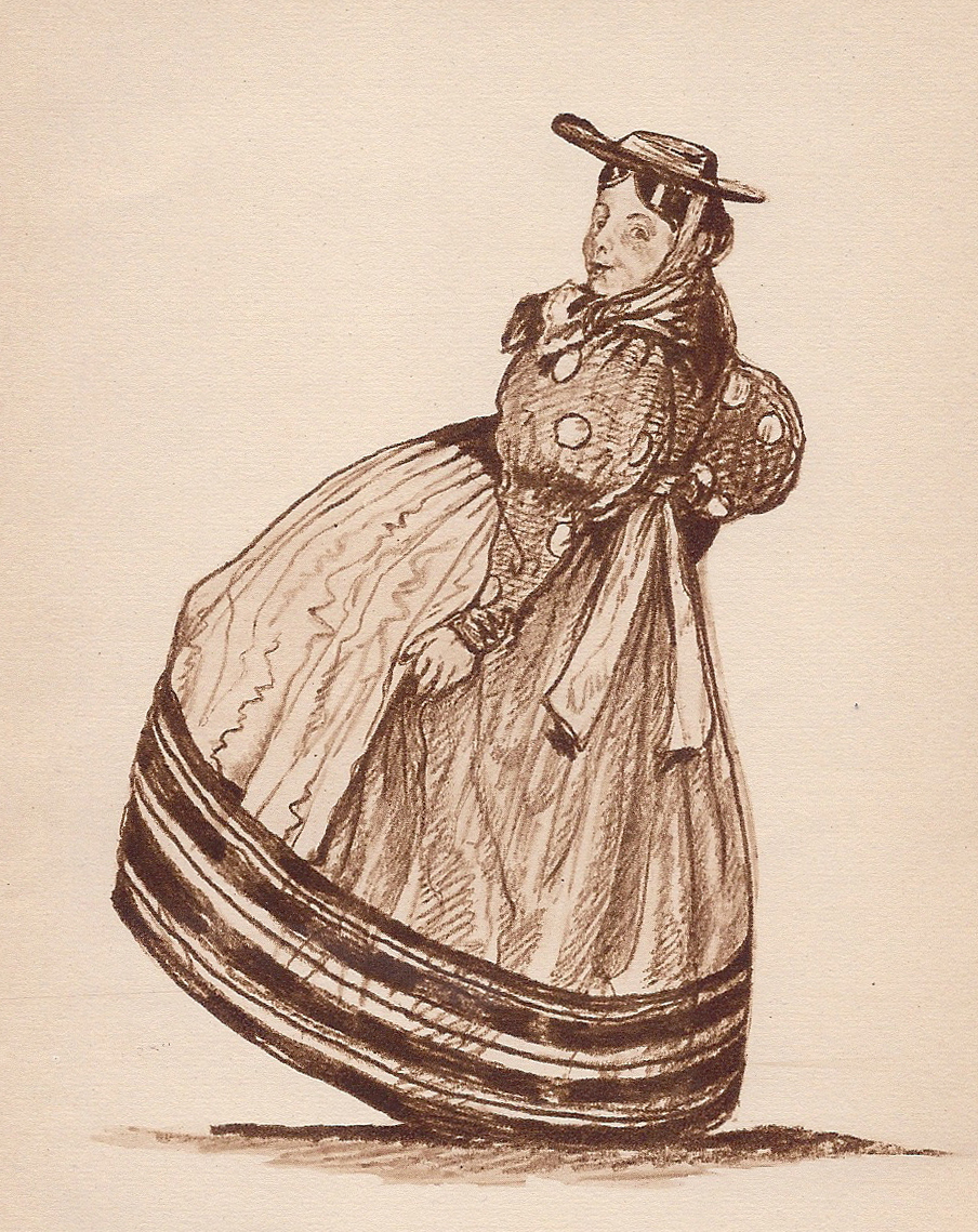 Die Tänzerin Niddy Impekoven in ihrem Tanz Münchener Kaffeewärmer zur gleichnamigen Komposition von Carl Englert. Druck nach einer Zeichnung von Leo Impekoven, ca. 1919.